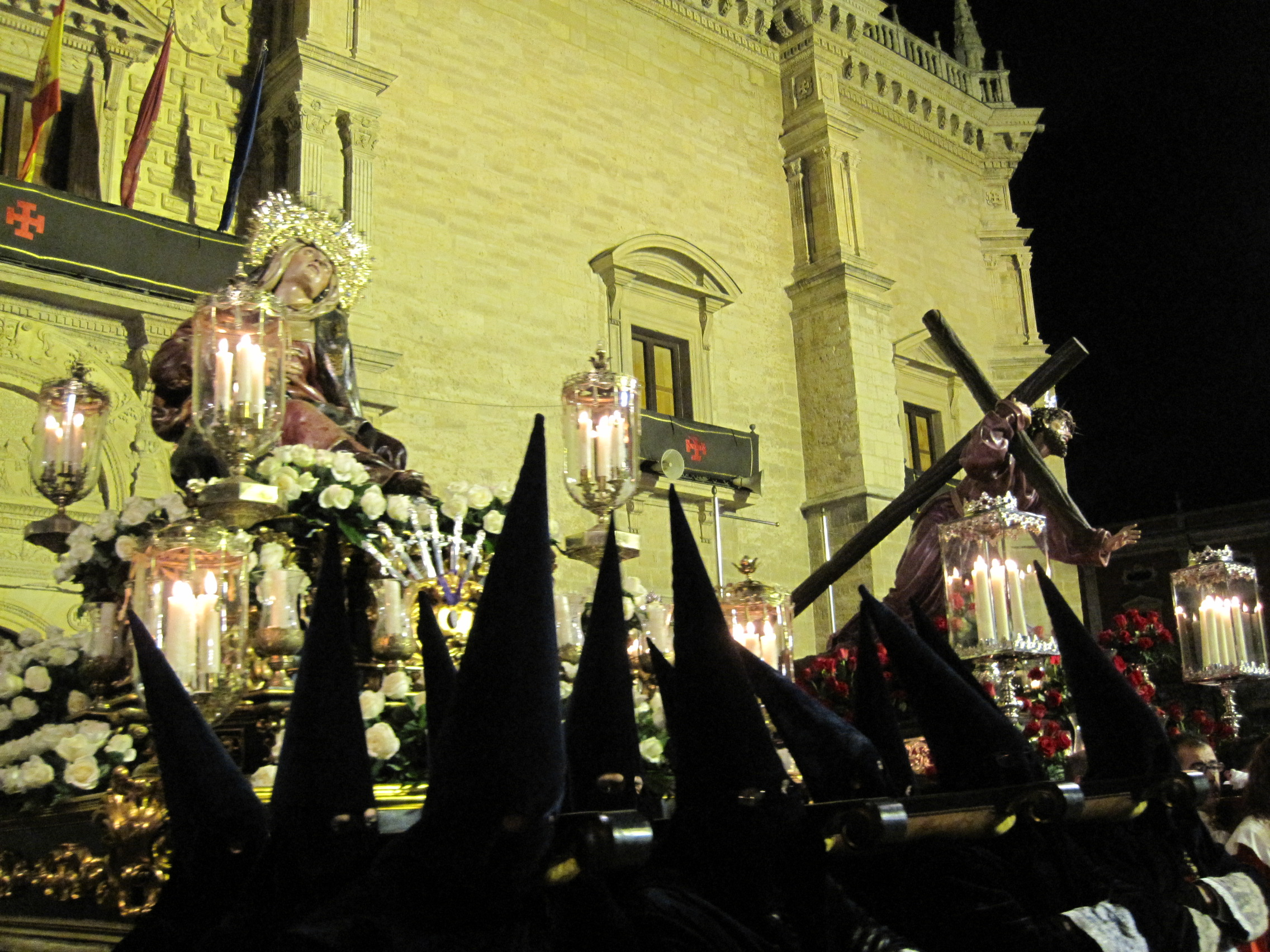 Momento de la procesión del Encuentro de la Virgen con su hijo en la calle de la Amargura. Martes Santo. Valladolid (España).